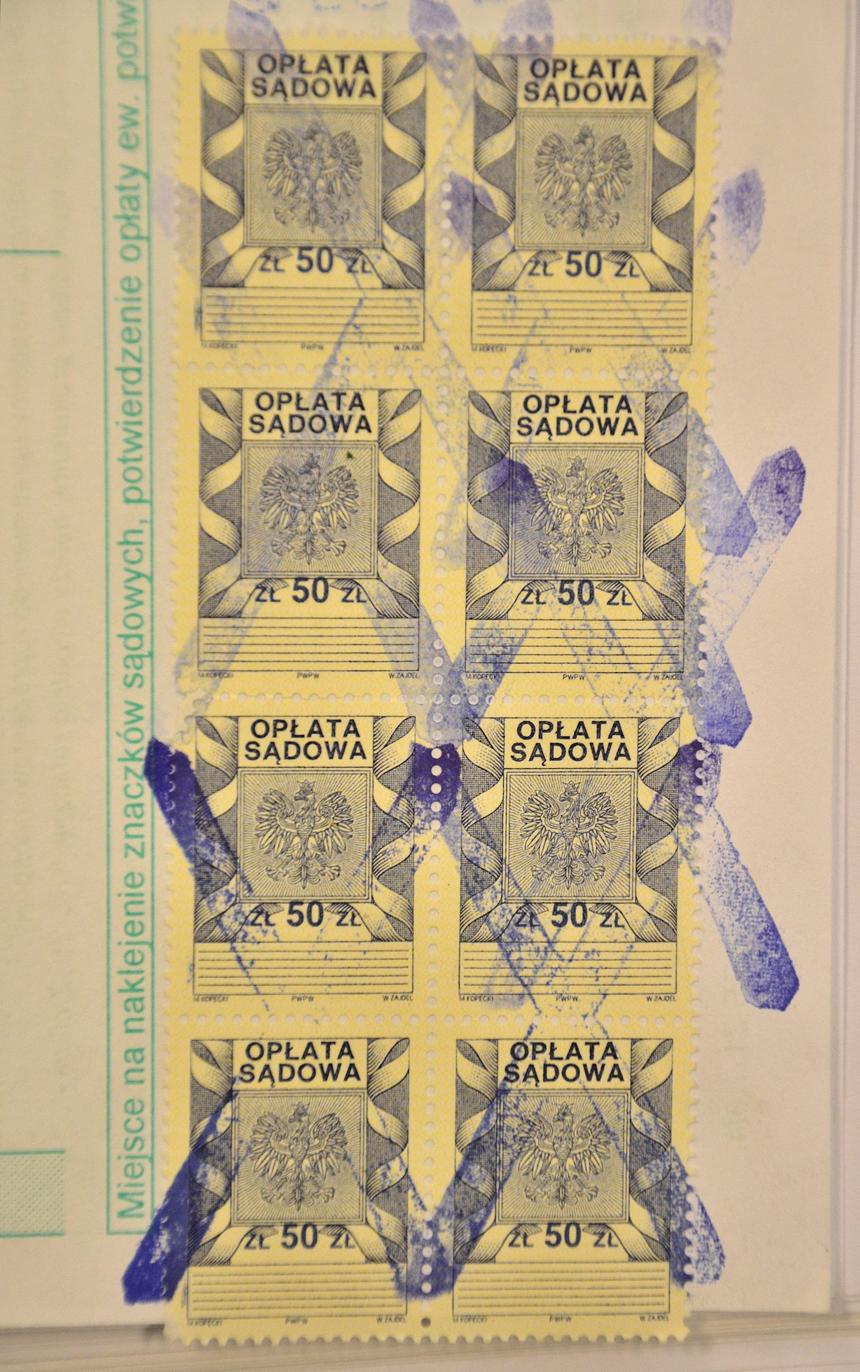 Skasowane znaki opłaty sadowej o nominale 50 PLN